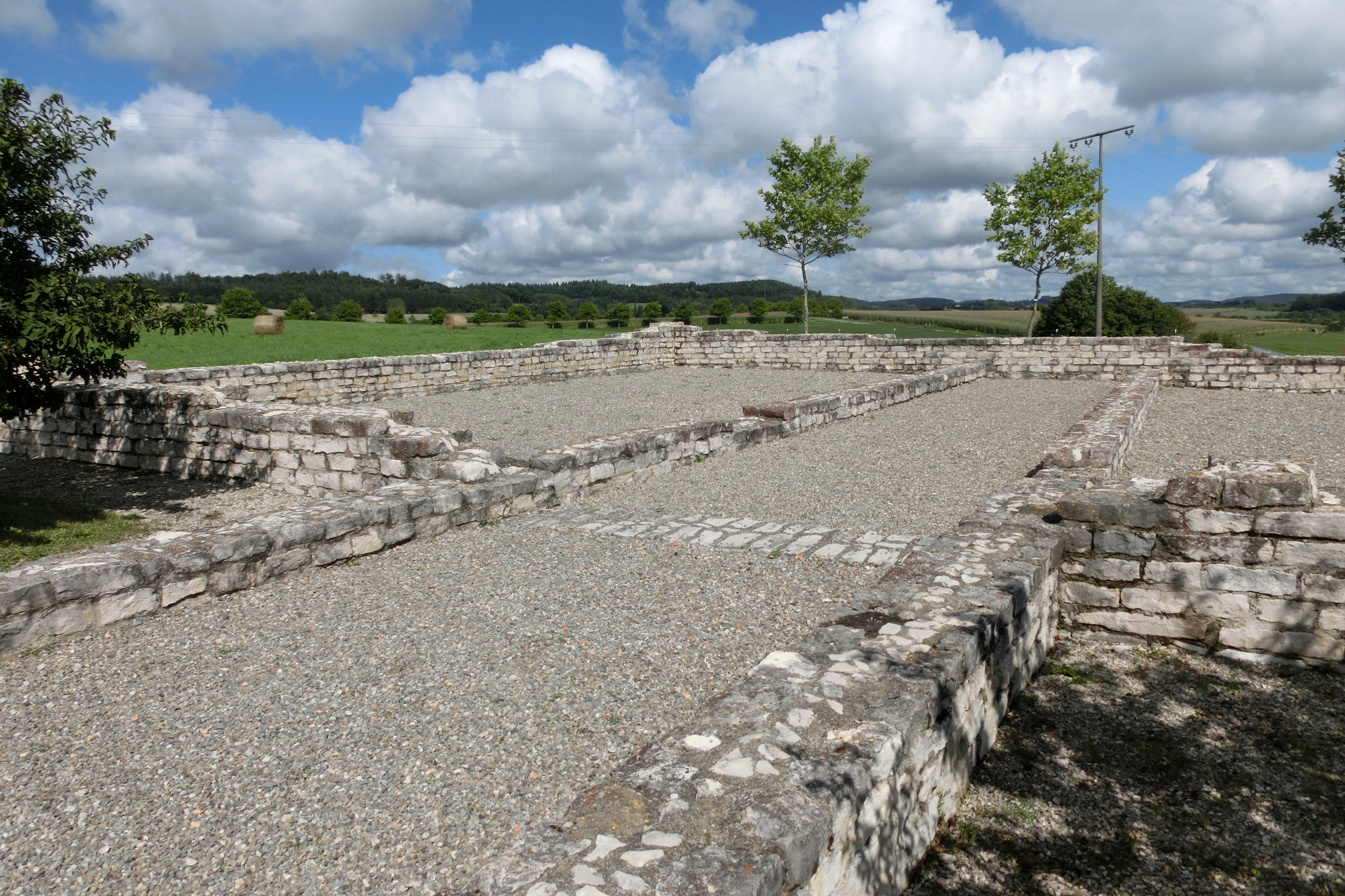 Deutschland (D) - Baden-Württemberg (BW) - Landkreis Konstanz (KN) - Eigeltingen: Römischer Gutshof (Villa rustica), Nebengebäude Ost